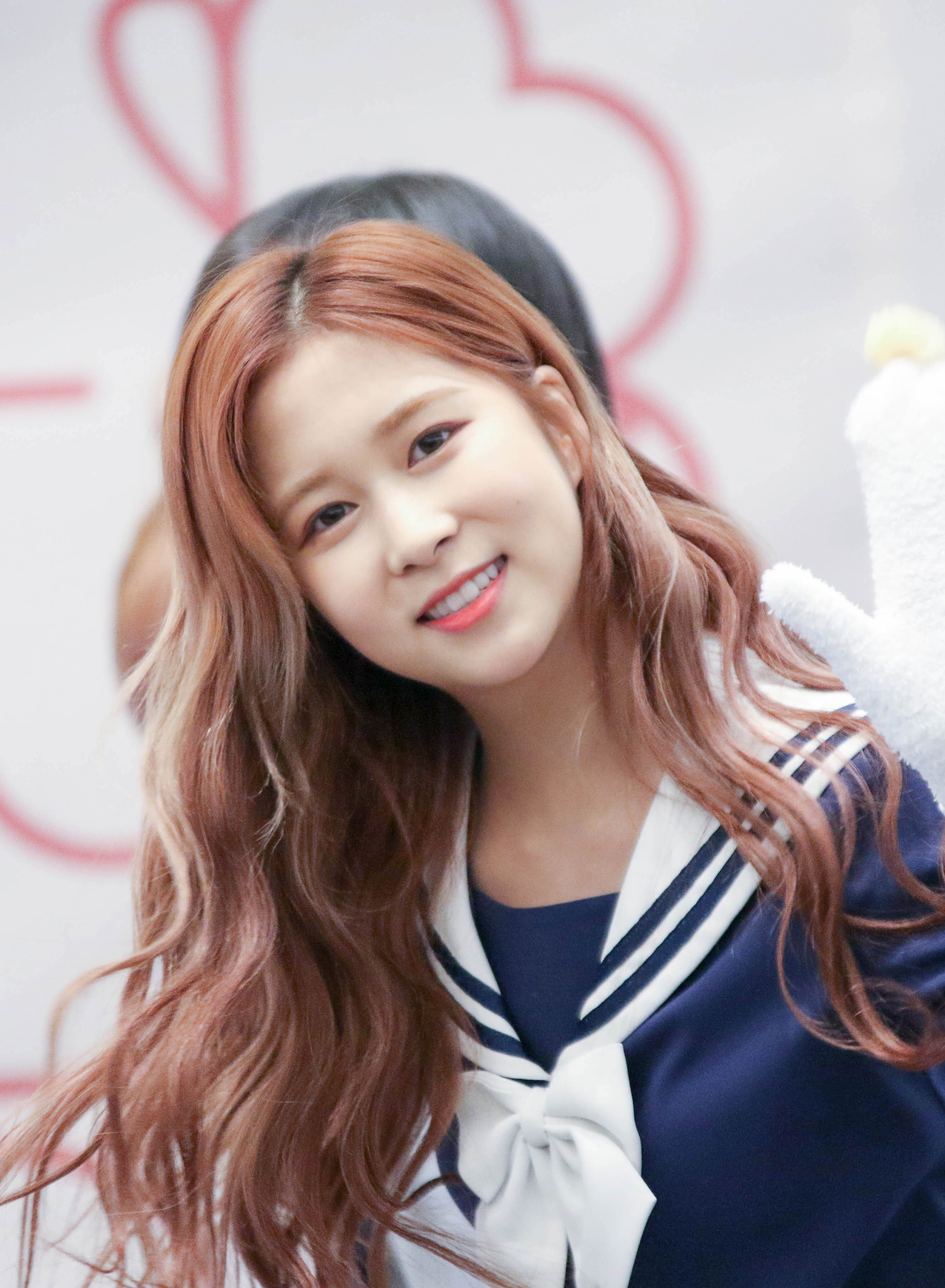 170129 하남 우주소녀 팬싸인회 다영